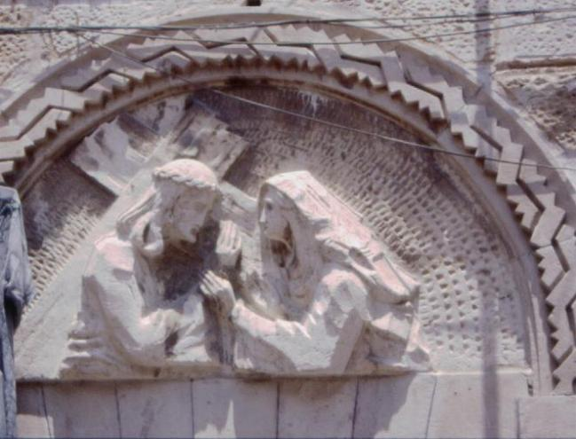 Via Dolorosa Station IV